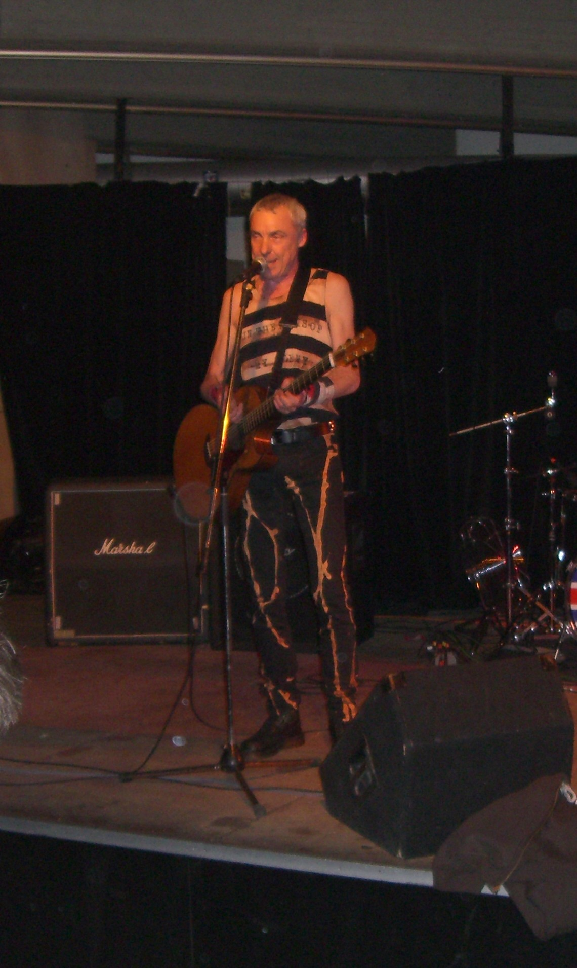 T.V. Smith in Stuttgart im Landespavillion am 25.4.2008